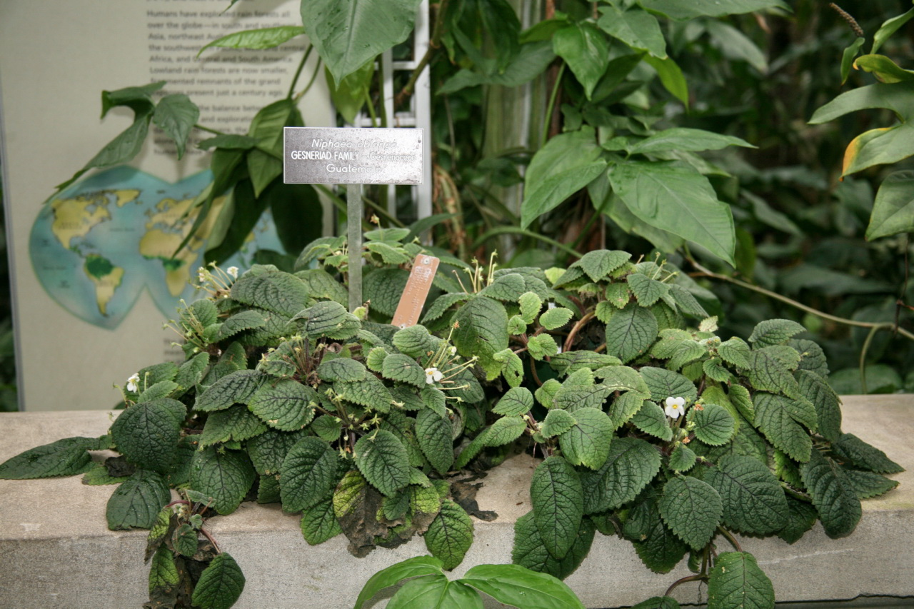 (Niphaea oblonga) Gesneraid Family